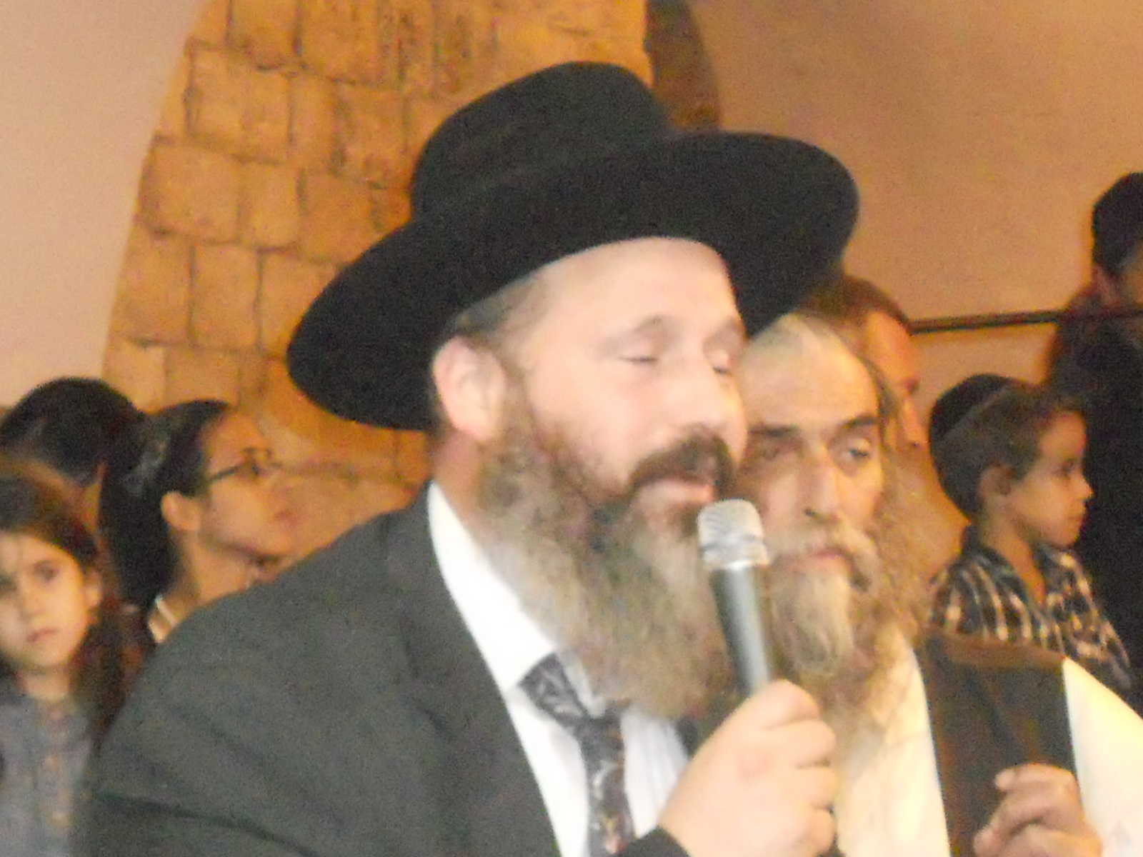 הרב יצחק גולדשטיין ראש ישיבת התפוצות בהר ציון בירושלים